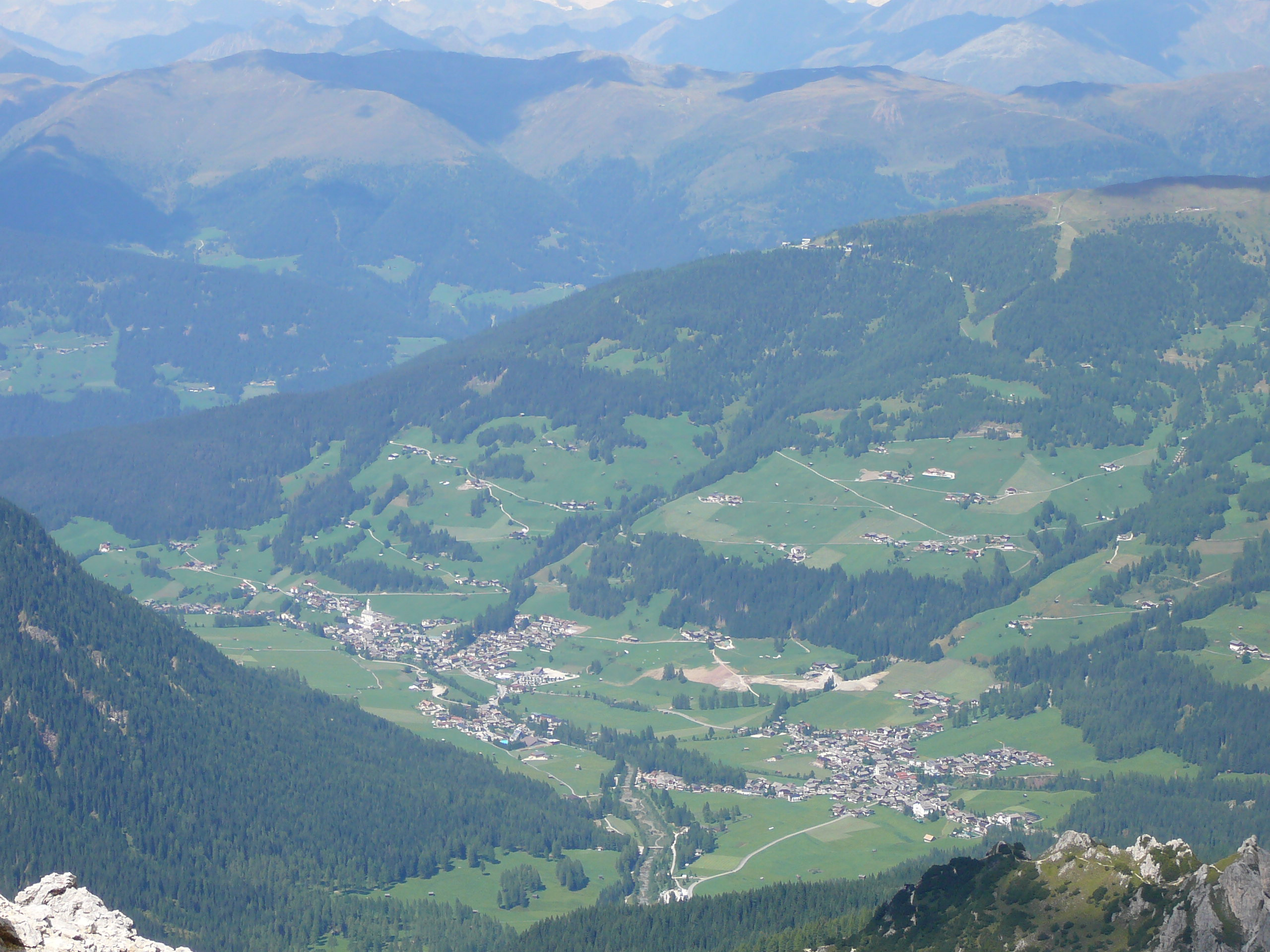 Sesto Pusteria